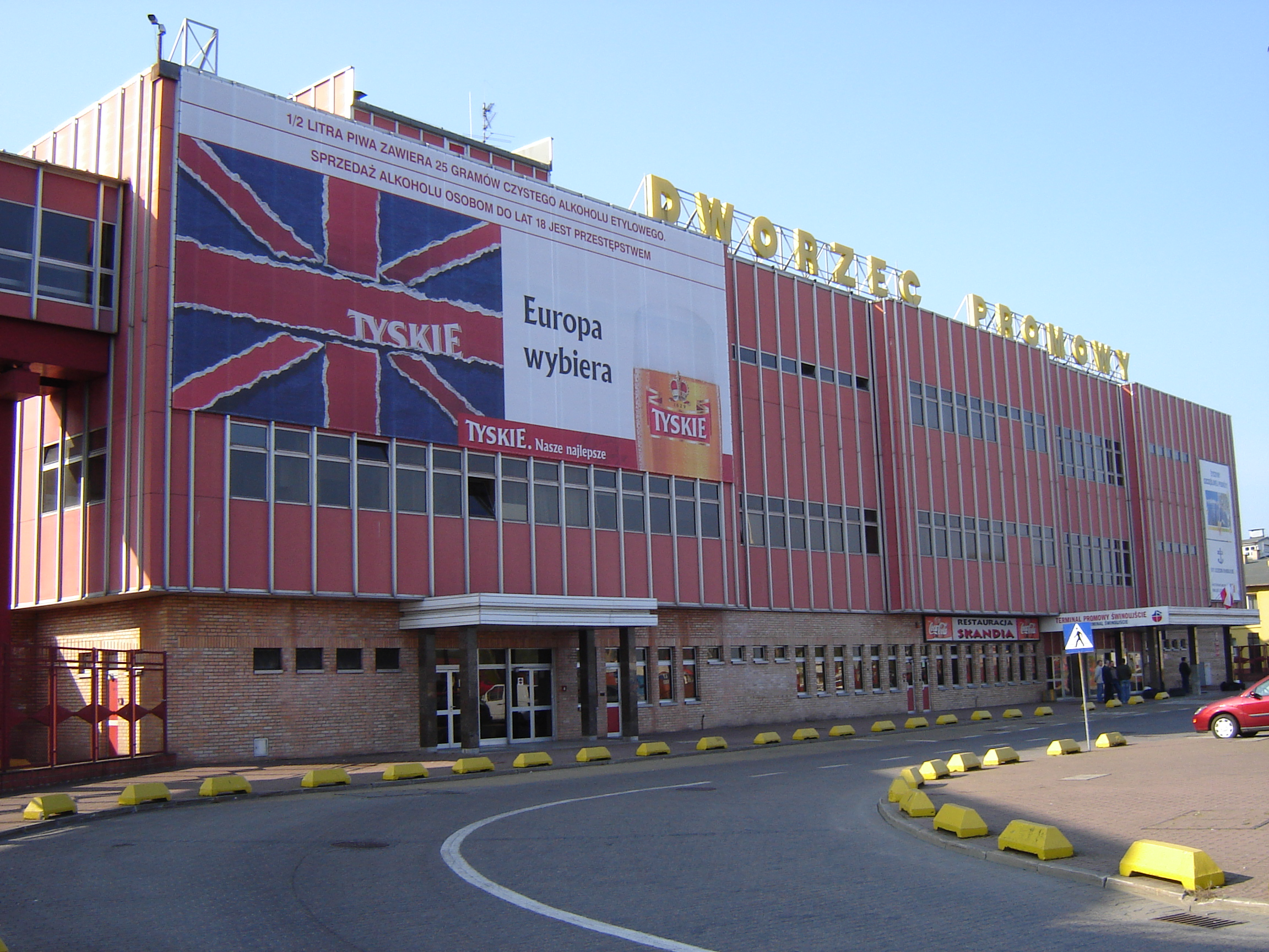 Dworzec Promowy w Świnoujściu